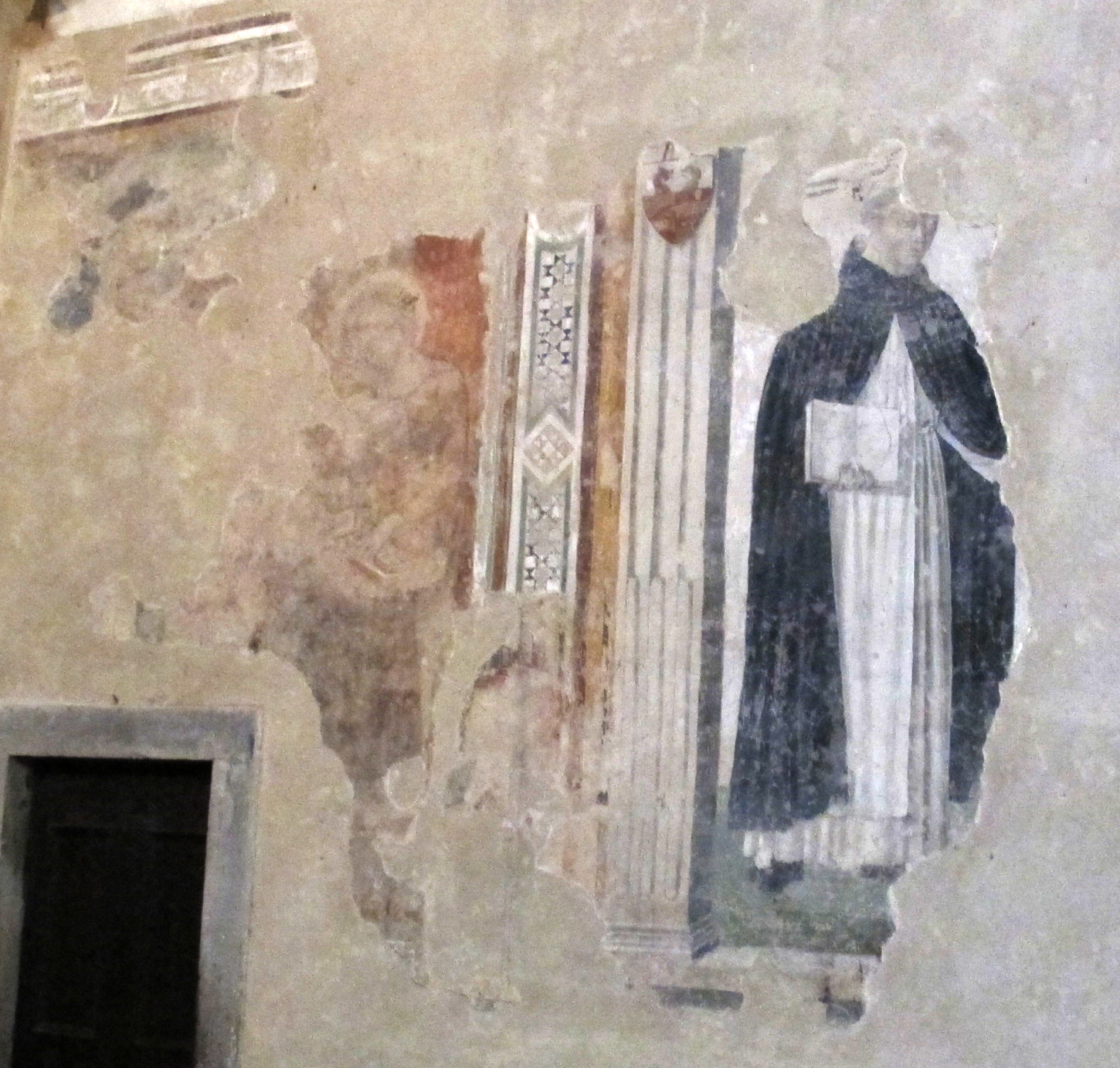 Vincenzo Ferrer